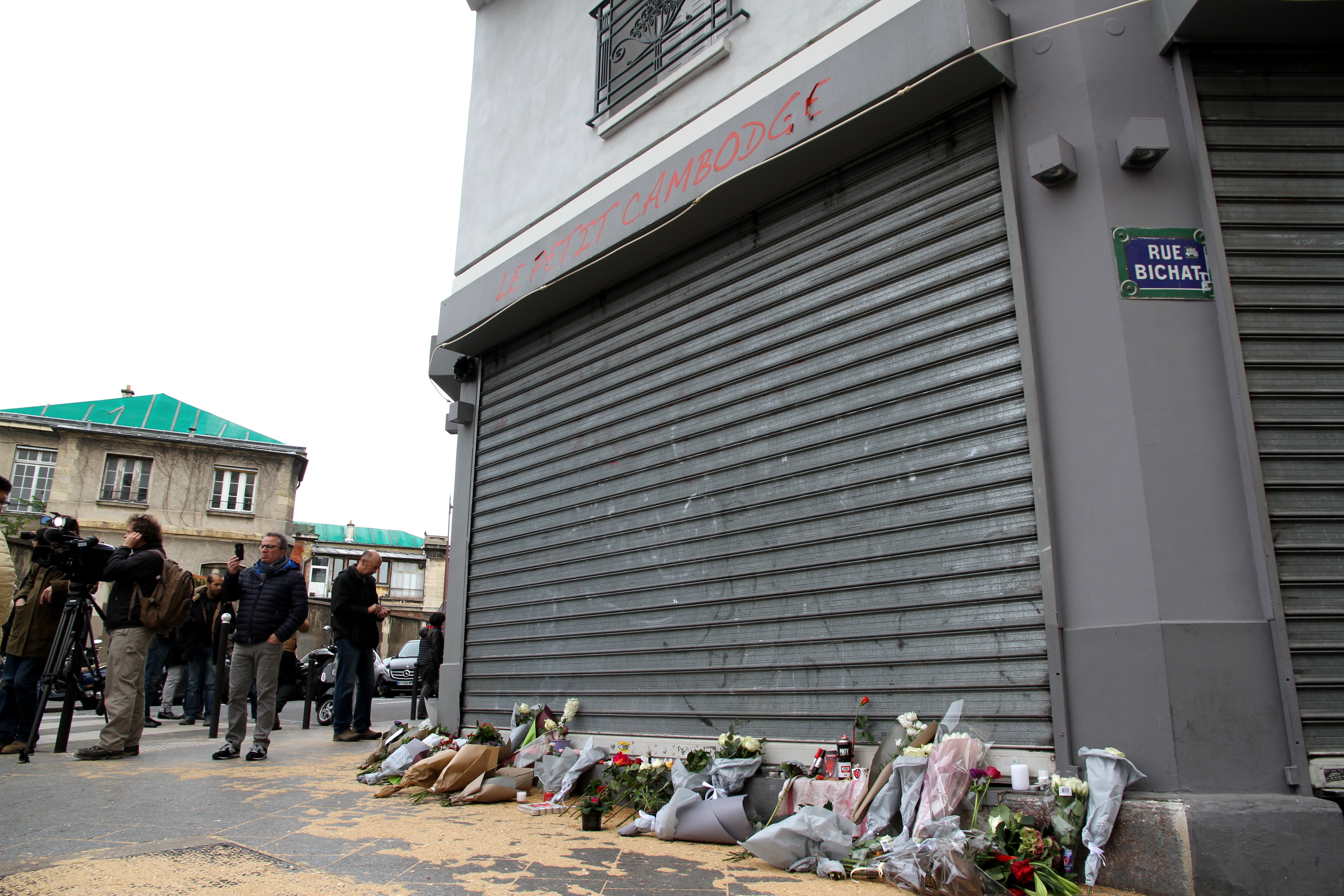 Volet roulant abaissé devant Le Petit Cambodge après les attentats de novembre 2015, rue Alibert, Paris, France.